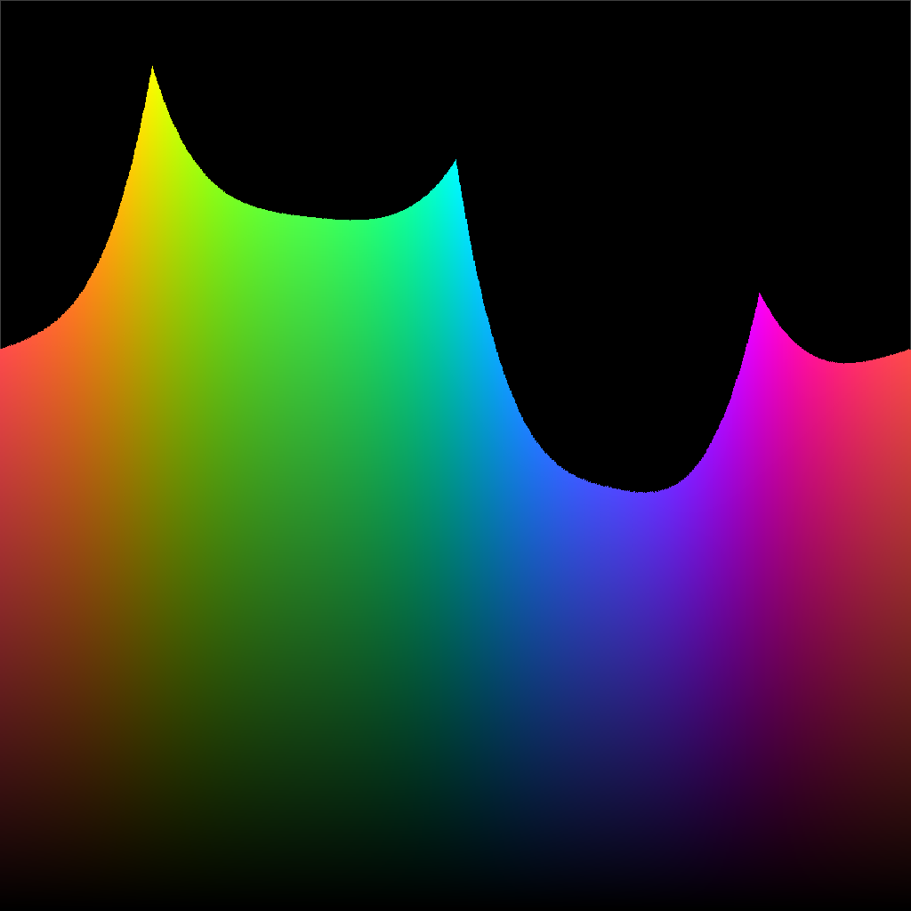 Doorsnede van de RGB-kleurenruimte met constante verzadiging (70%)